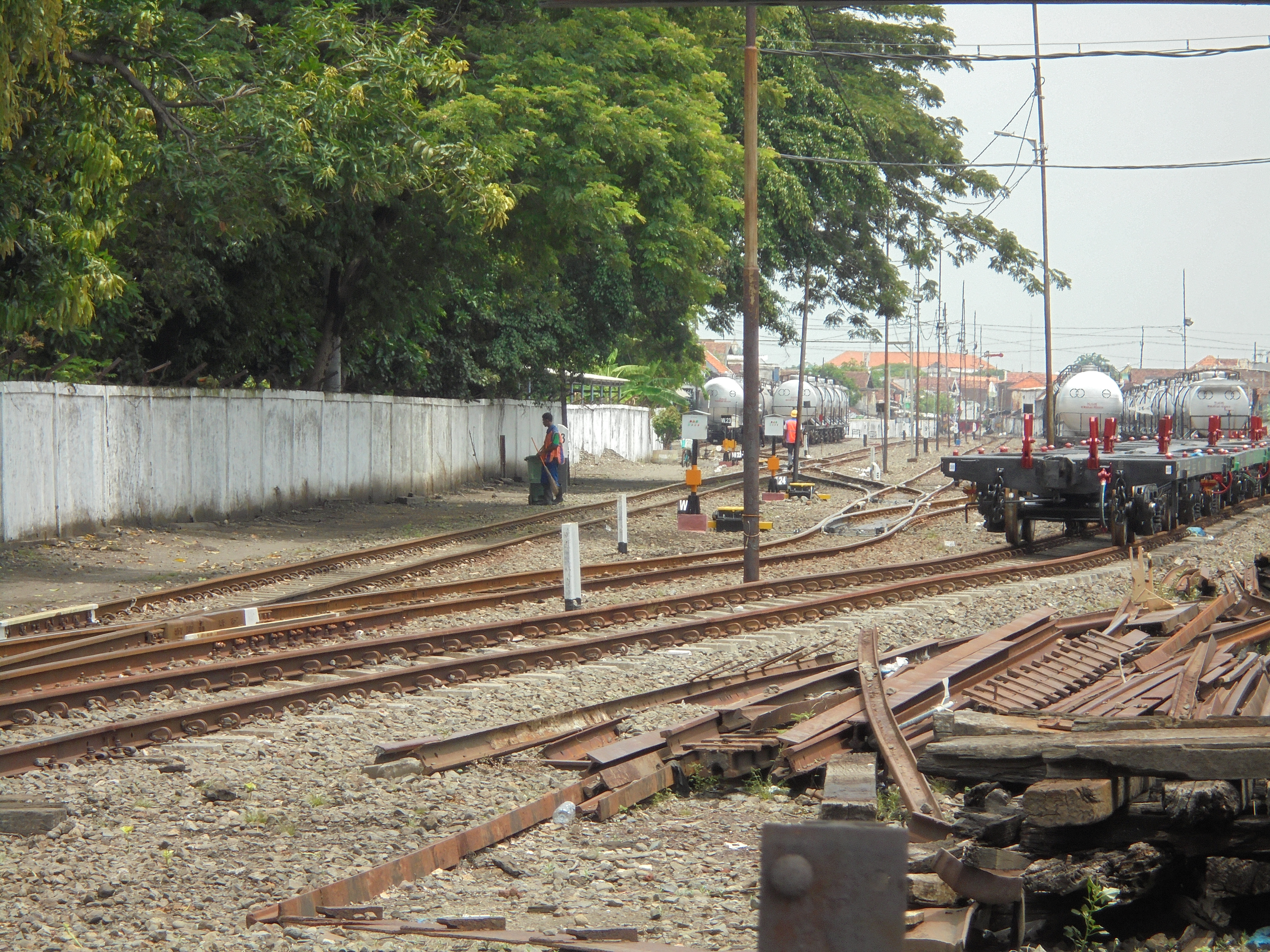 Emplasemen Stasiun Benteng tahun 2020. Stasiun ini hanya digunakan untuk melayani kereta ketel/bahan bakar minyak (BBM)